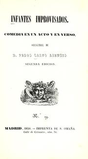 Portada de su obra Infantes improvisados (1847)